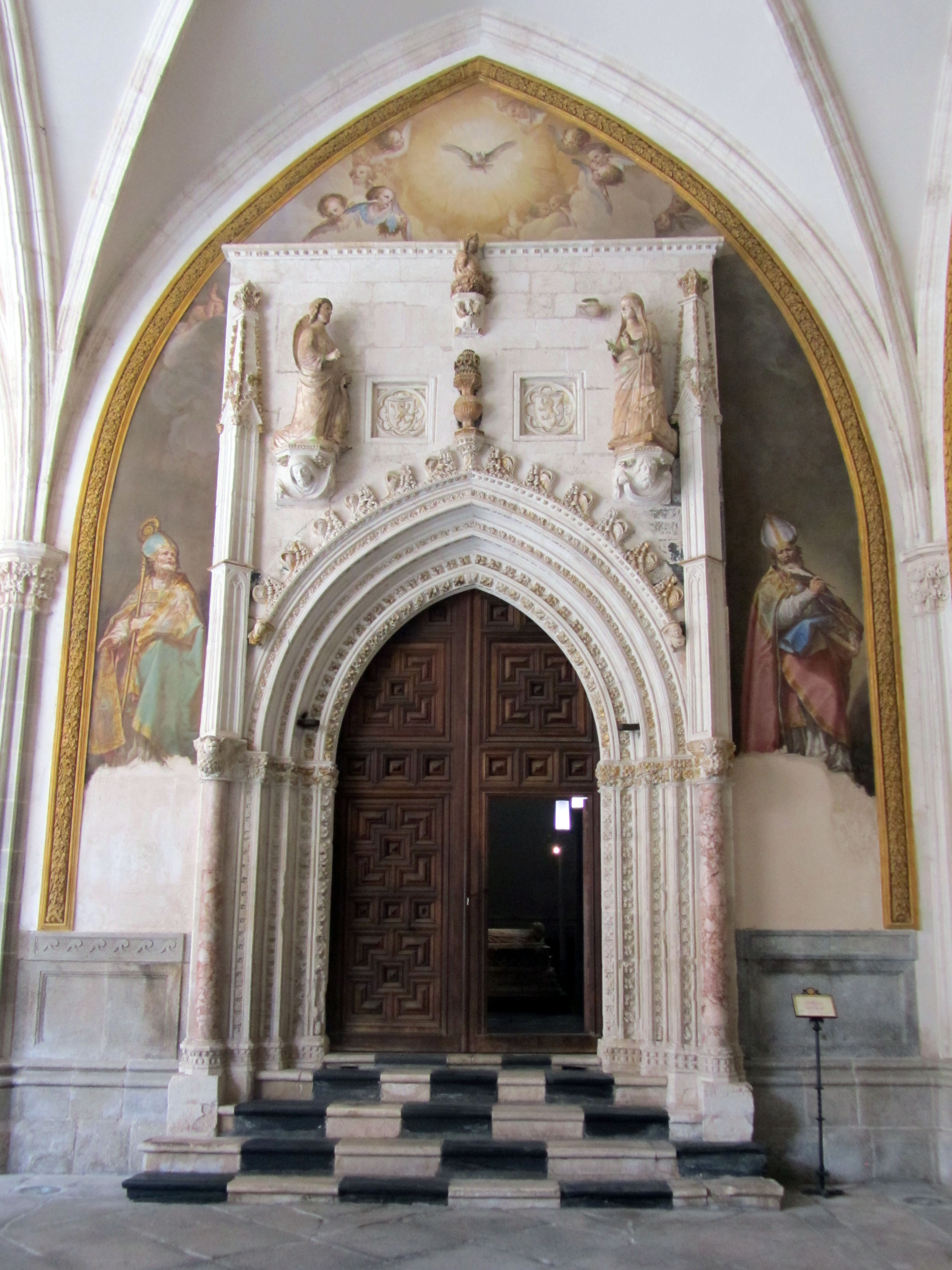 Puerta a la capilla de San Blas por el claustro de la catedral de Toledo (Spain )